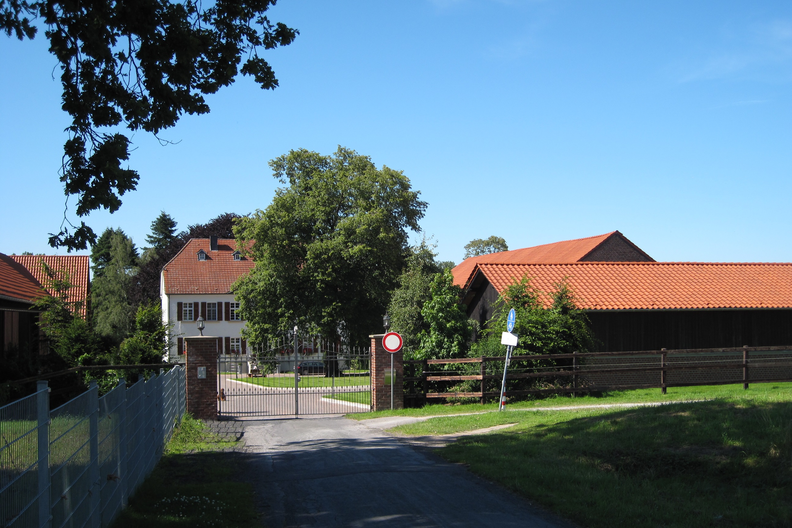 Gut Beringhof in Wickede (Ruhr)-Wimbern, Zum Beringhof 3. This image shows a heritage building in Germany, located in the North Rhine-Westphalian city Wickede (Ruhr) (no. 12).